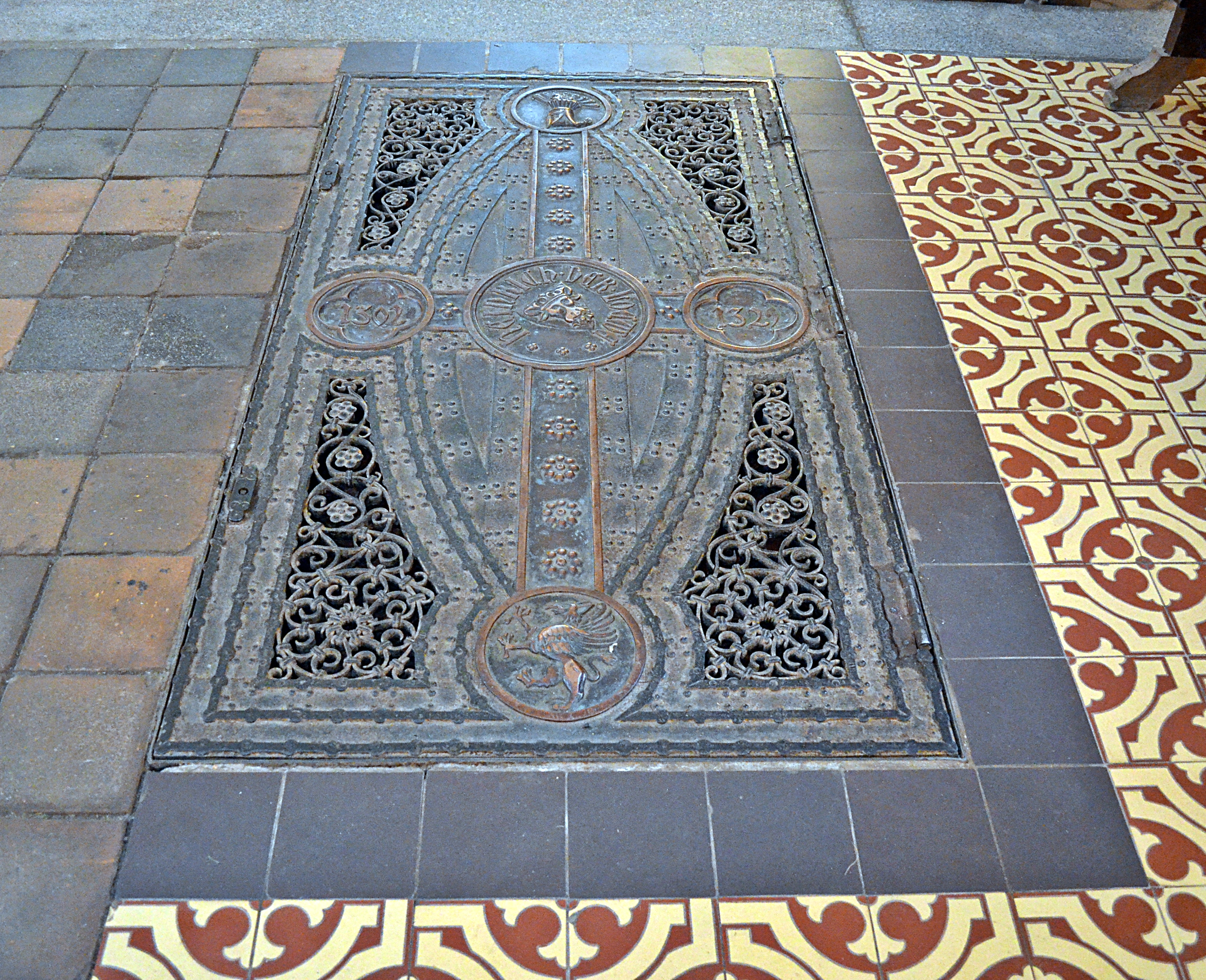 Bad Doberan, Münster, Grabplatte, Heinrich der Löwe. S